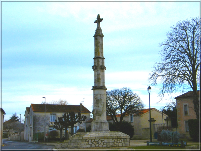 croix hosanniere chermignac